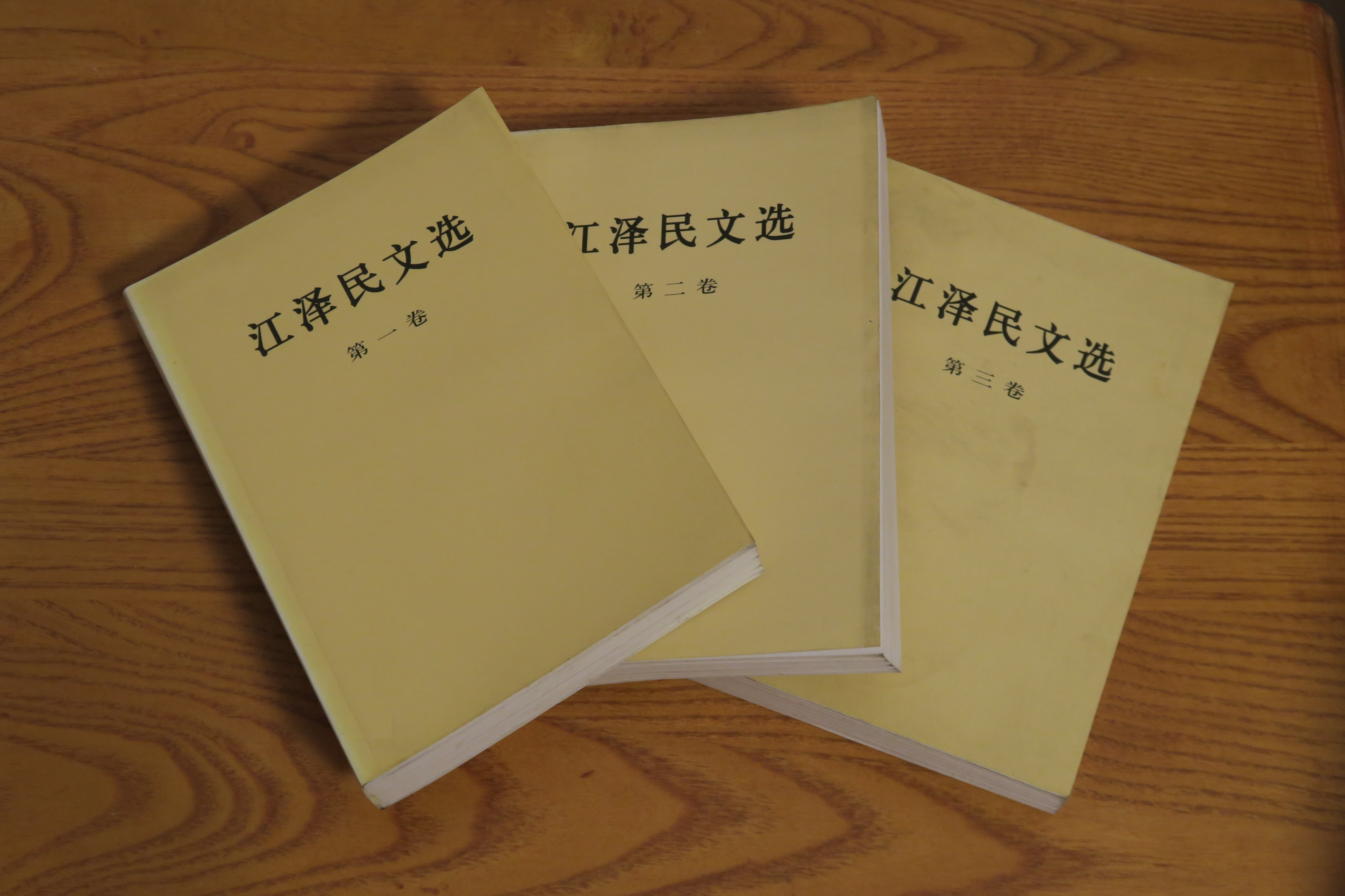 人民出版社2006年版《江泽民文选》三卷本。该封面设计低于原创性门槛，因而翻拍不侵犯版权。